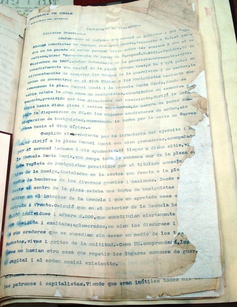 Relación del general Silva Renard al día sisguiente de la masacre de la Escuela Santa María de Iquique de 1907. Archivo Nacional de Chile.